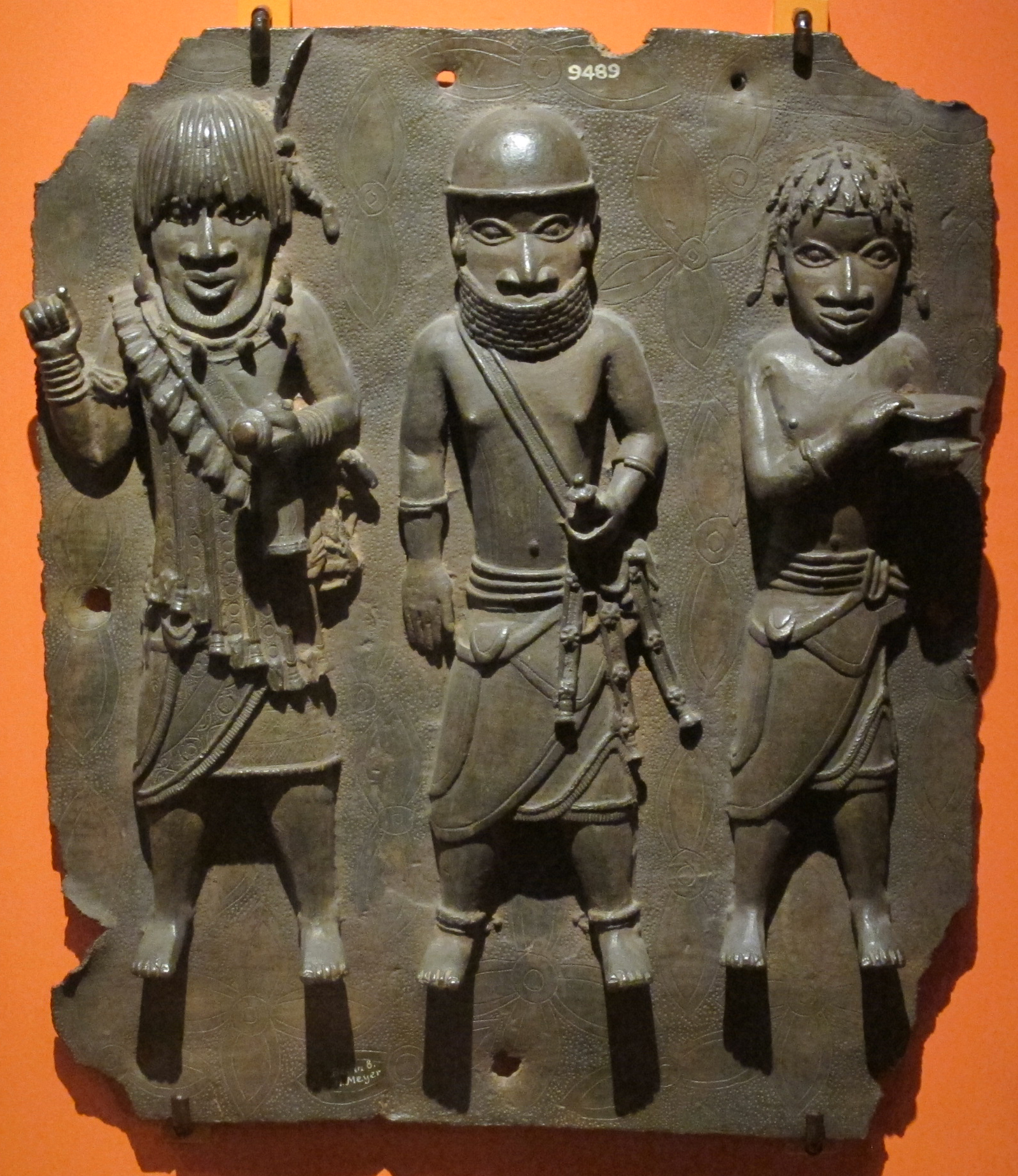 Benin, placca con tre guerrieri, XVI-XVII sec